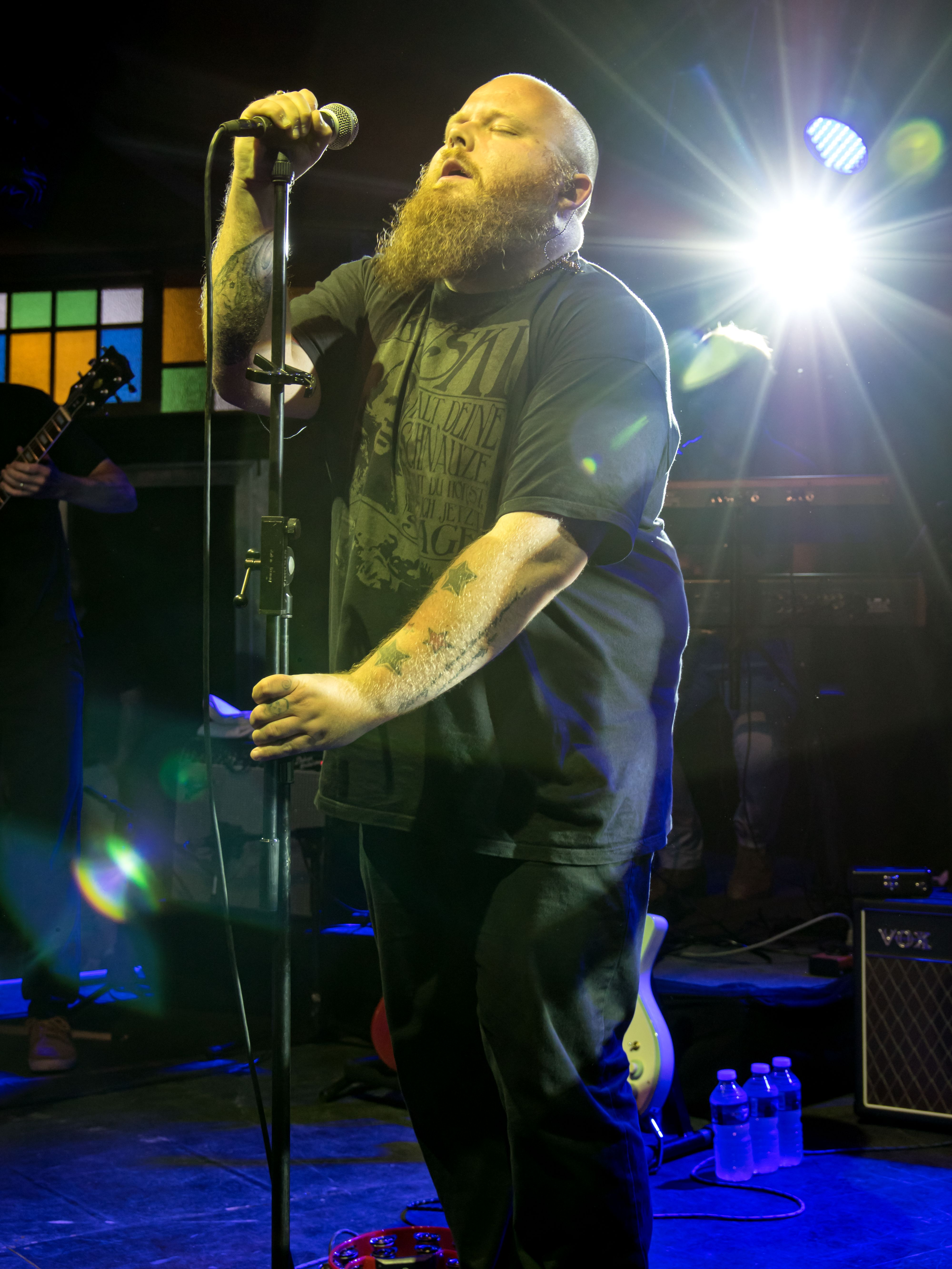 Bilder vom Zelt Musik Festival 2016 in Freiburg im Breisgau Andreas Kümmert